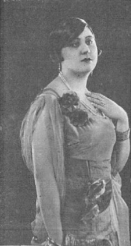 Fotografía de la actriz española Luisa Rodrigo publicada en 1926